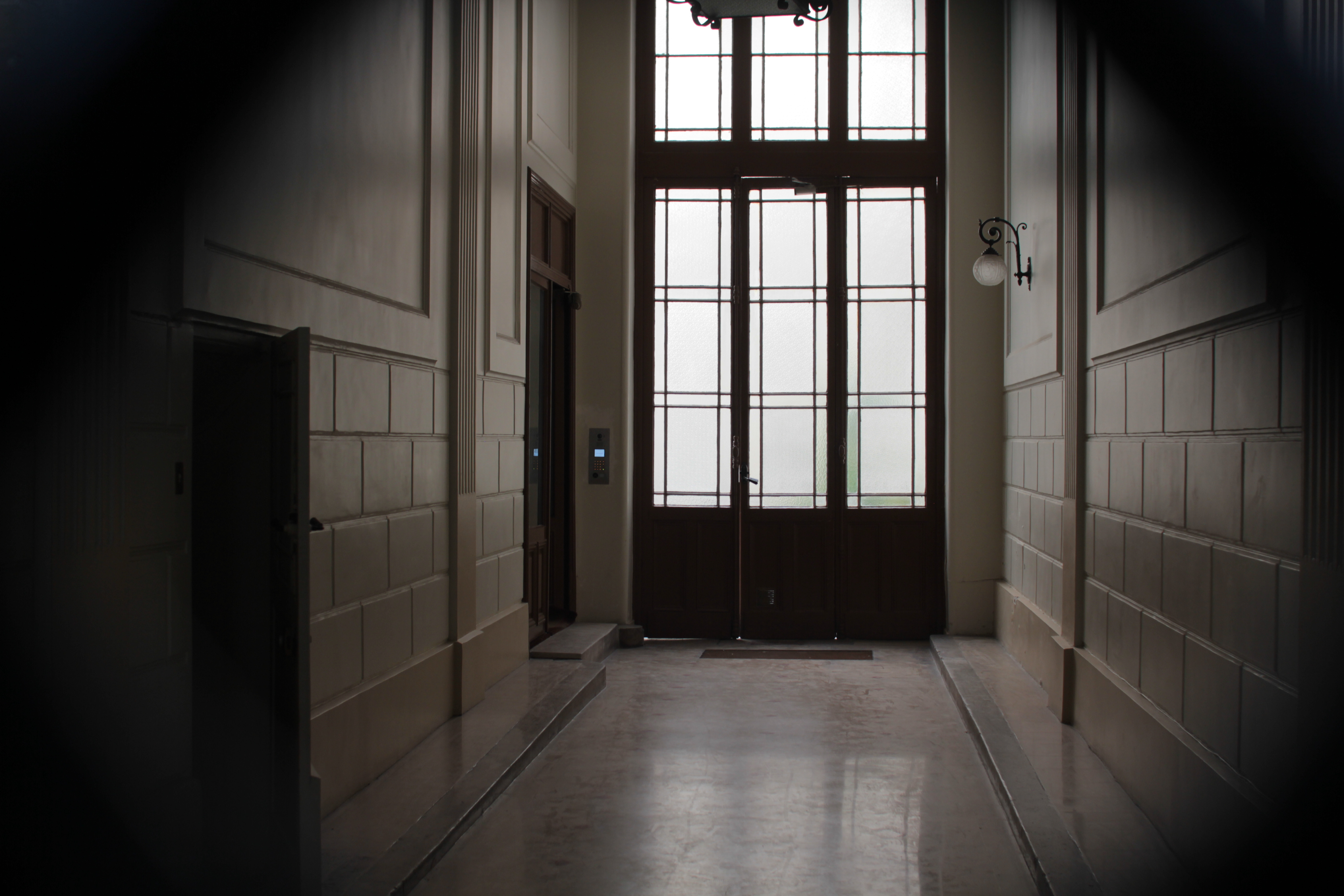 De gang van het pand gelegen aan de Avenue Niel (nr 86), waar Willem Frederik Hermans meerdere jaren gewoond en gewerkt heeft.